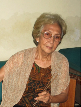 Dr. Gretha Zahar .png